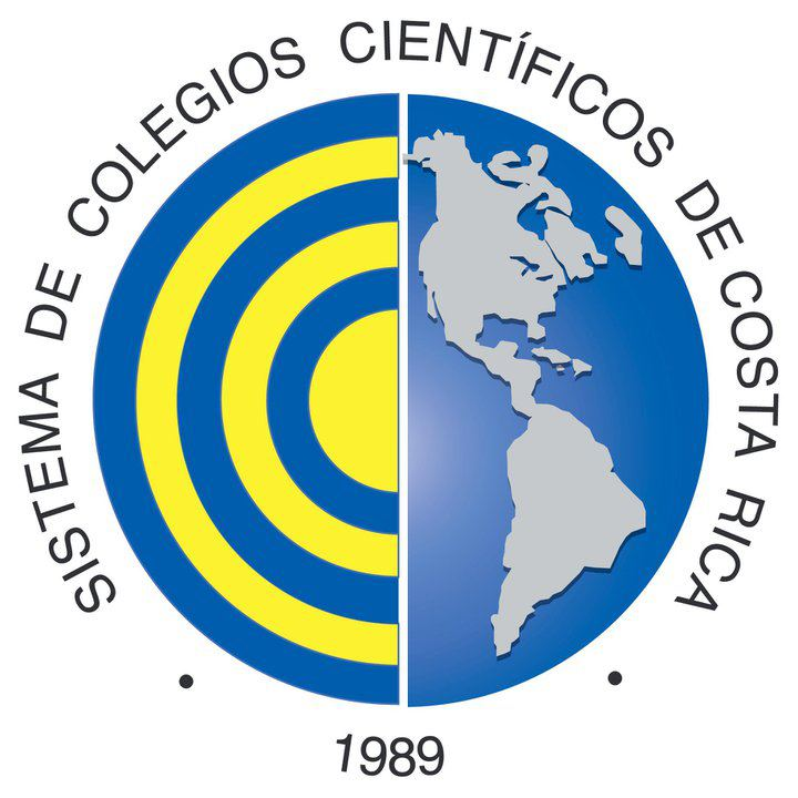 Escudo de los colegios cientificos